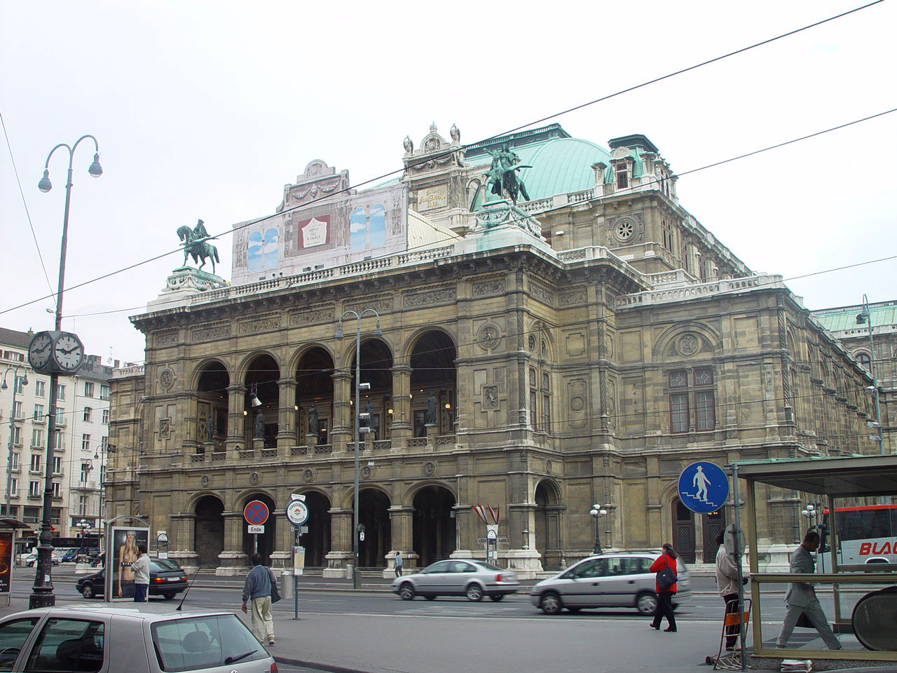 Viena Opera